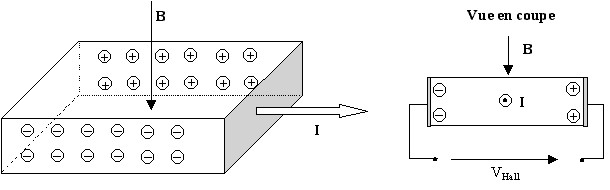 dessin perso